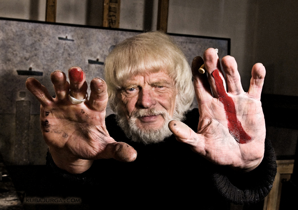 Fotografia wykonana podczas sesji fotograficznej wykonanej przez Kuba Jurga w pracowni artysty